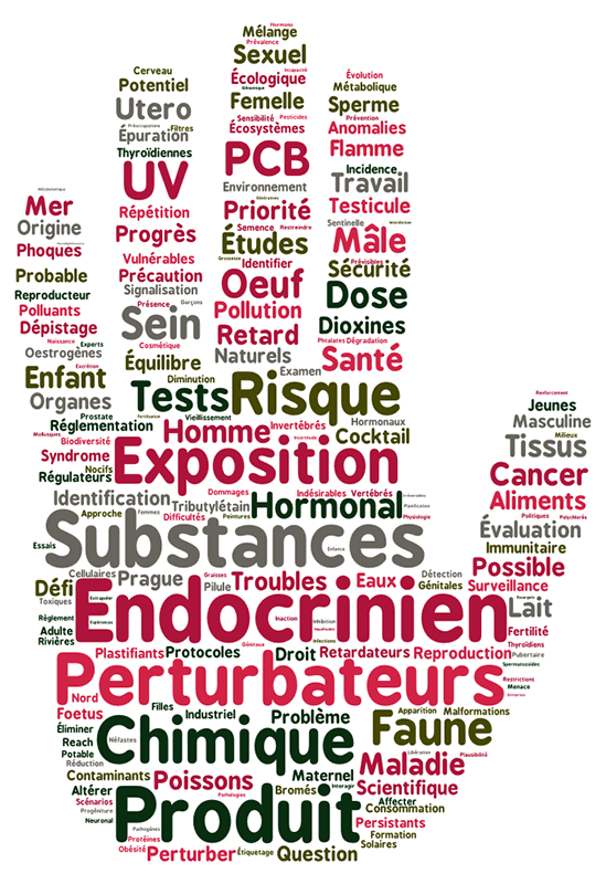 D'après la version française de l'Appel de Prague (mai 2005) sur les perturbateurs endocriniens